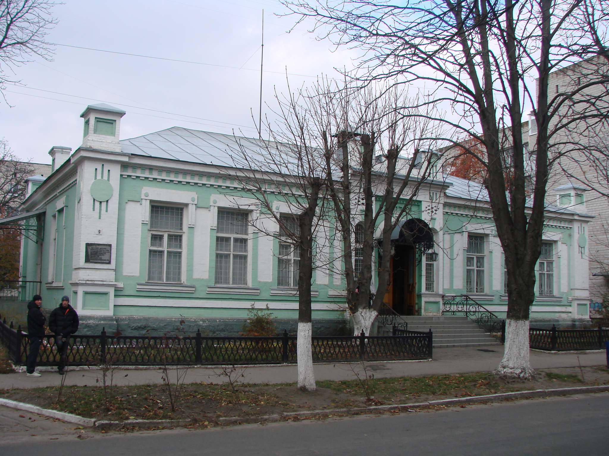 Садибний будинок, Фастів